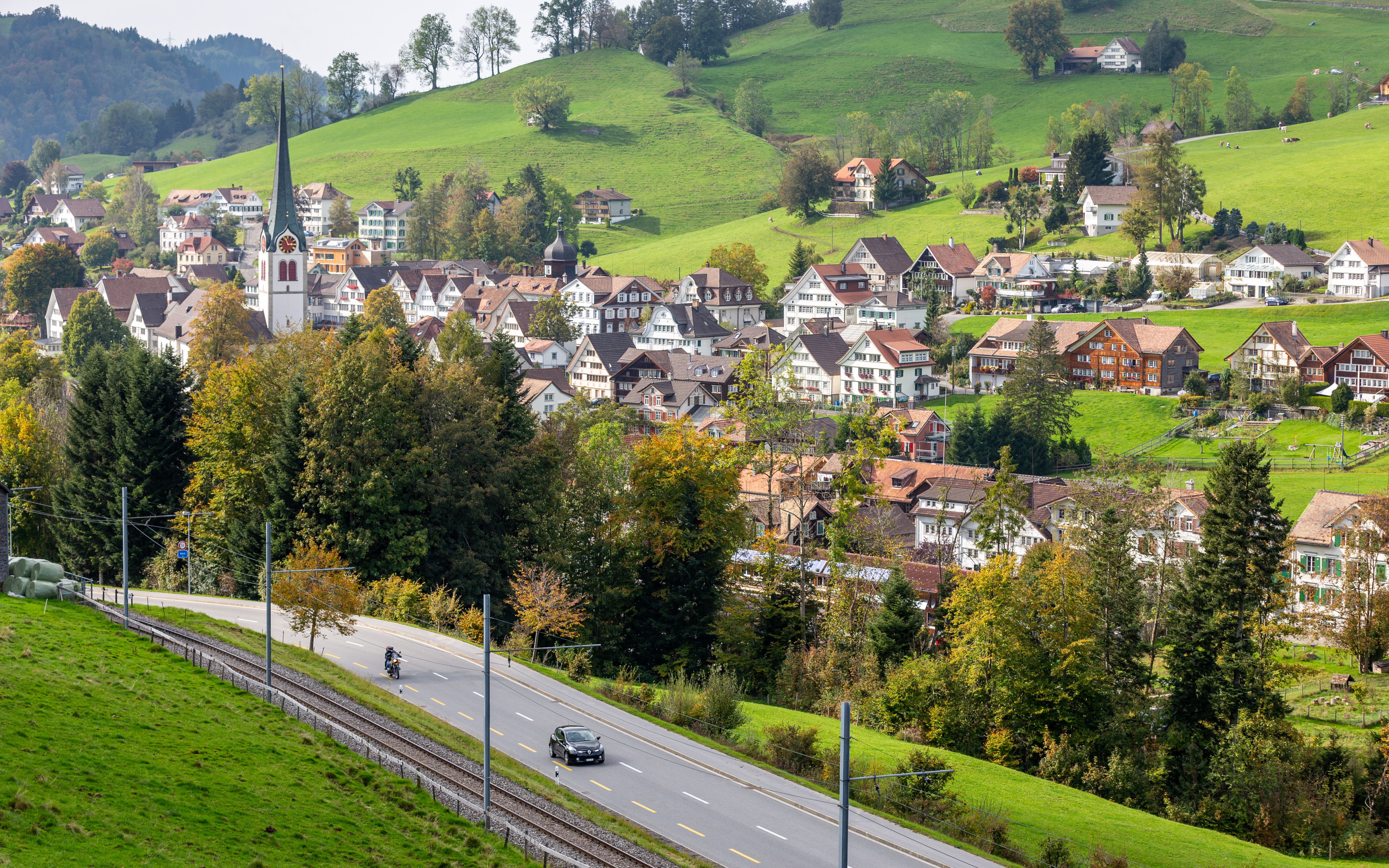 Blick auf Gais AR